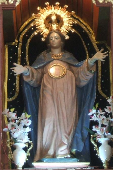 La Virgulino de la O.